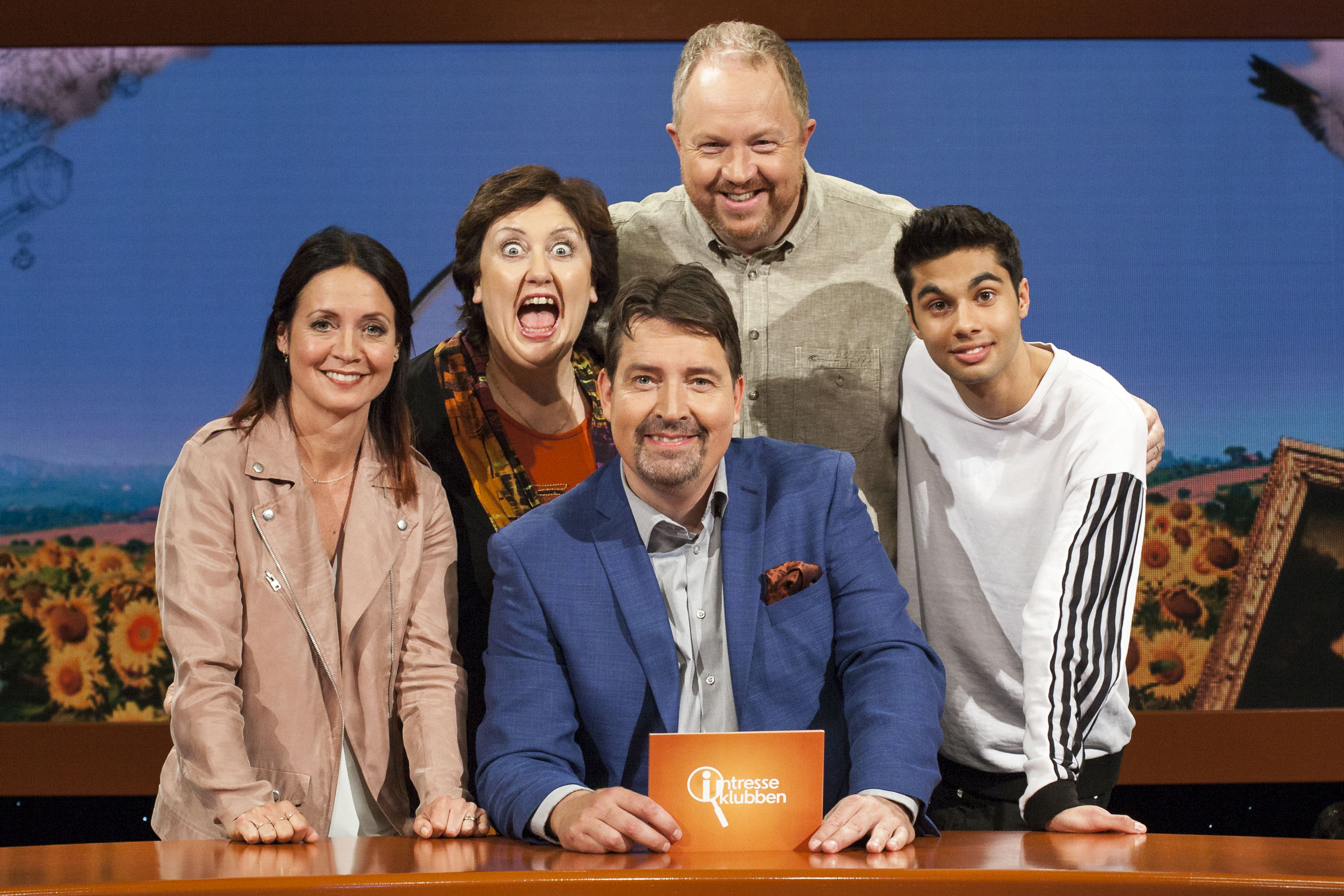 Delatagarna i premiäravsnittet av SVT:s Intresseklubben. F.v.: Pernilla Månsson Colt, Babben Larsson Anders Jansson (ständig panelmedlem), William Spetz och programledaren Johan Wester.